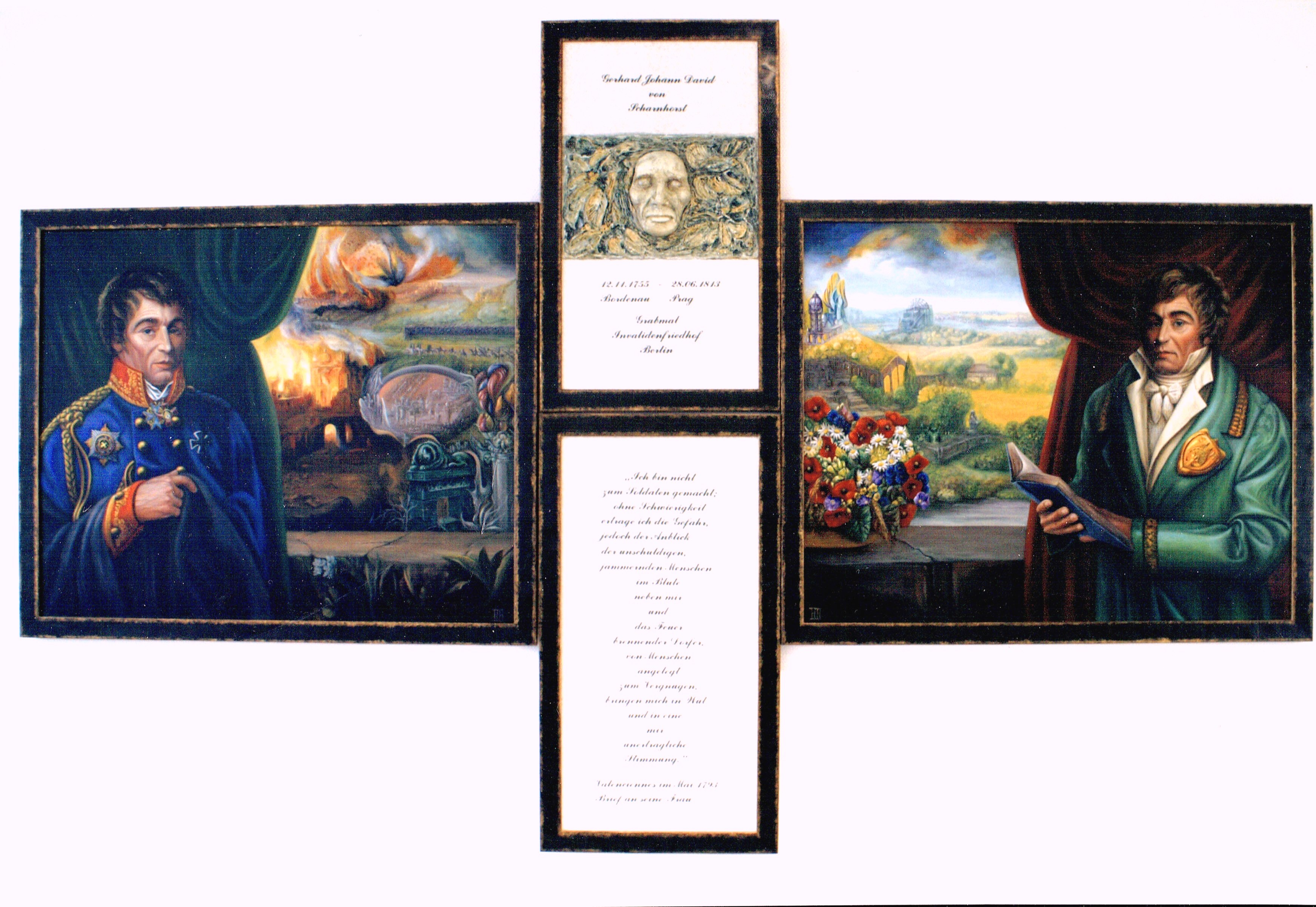 Triptychon zu Ehren des Generals Gerhard Johann David von Scharnhorst. Geschaffen von Bruni Braun